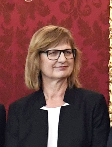 Am 3. Juni 2019 wurde Mag. Alexander Schallenberg als Bundesminister für Europa, Integration und Äußeres angelobt. Foto: Mahmoud